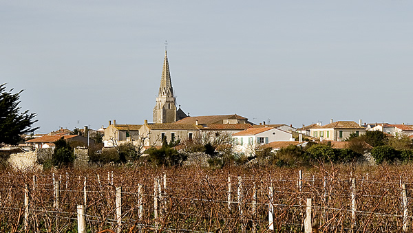 Le village de Sainte-Marie-de-Ré au milieu des vignes. Photo issue de ma banque d'images personnelle